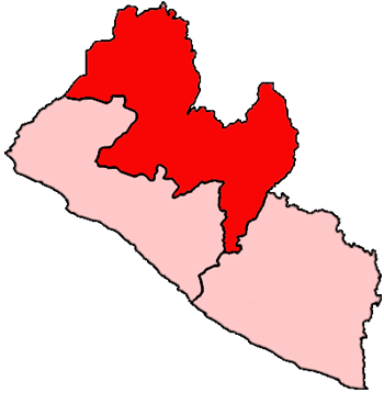 Mappa della diocesi cattolica di Gbarnga, in Liberia.